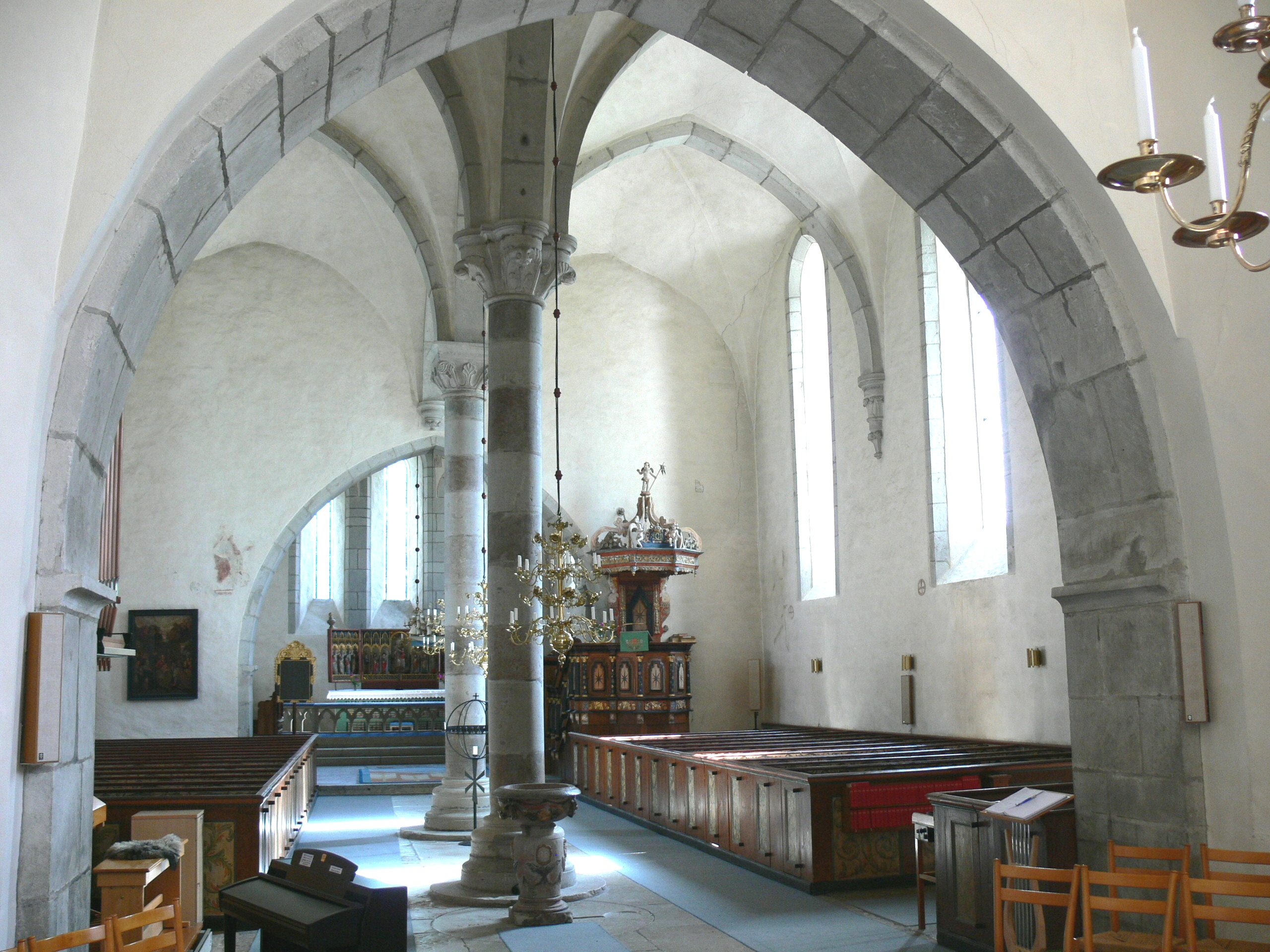 Lärbro kyrka auf Gotland. Innenraum